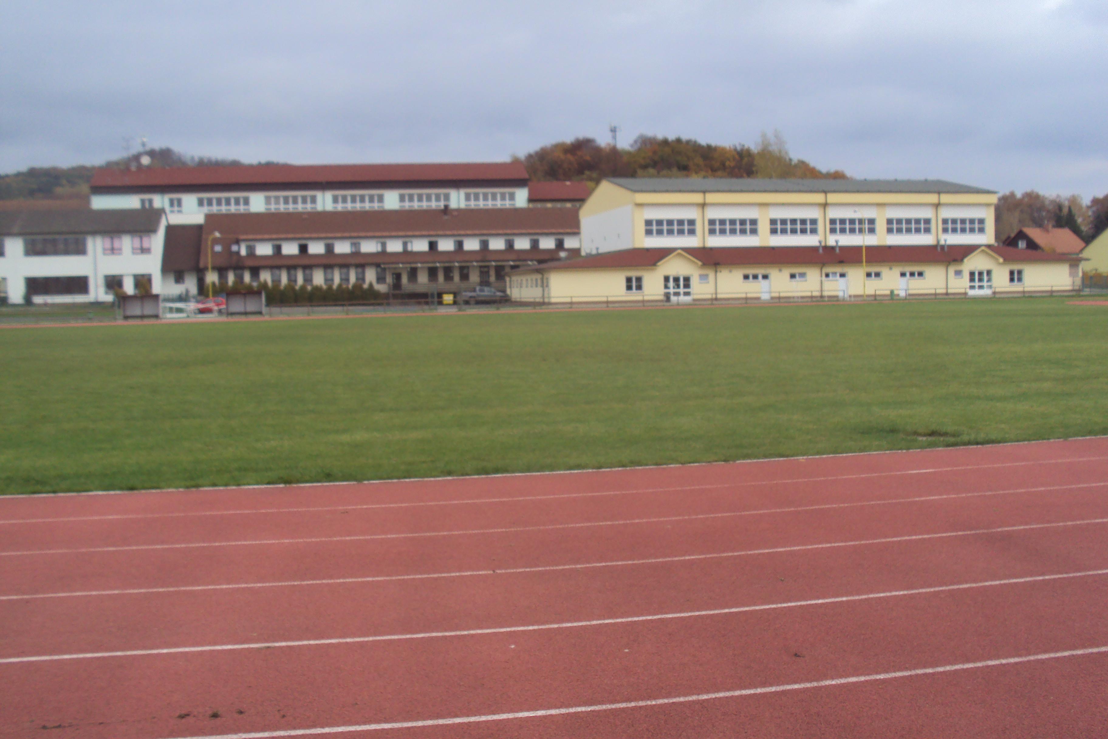 Pohled na školní budovy ze školního hřiště